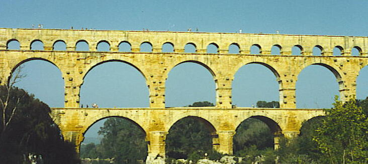 Pont du Gard